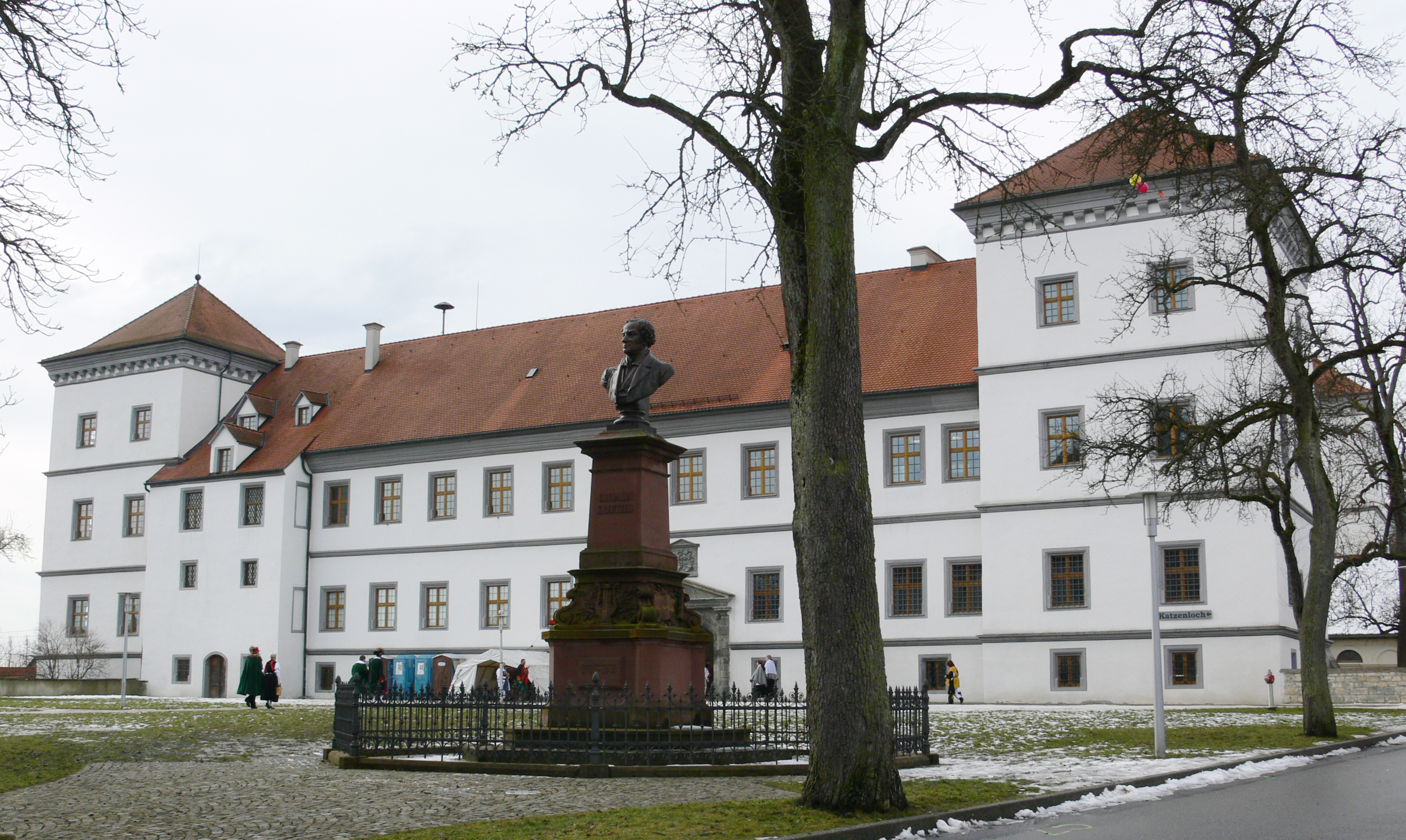 Meßkirch, Germany: Schloss